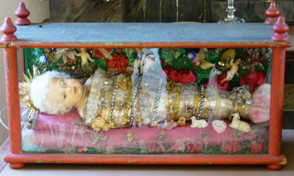 Fatschenkind aus Gutenzell von 1830-1840 Kreisfreilichtmuseum Bad Schussenried-Kürnbach selbst fotografiert von user:Enslin am 24.9.2005